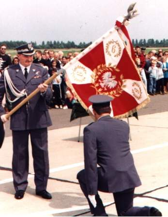 W imieniu Prezydenta RP sztandar wręcza gen. dyw. pil. Mieczysław Walentynowicz (Zastępca Dowódcy WLOP) - przyjmuje ppłk Piotr Luśnia. autor: Joymaster